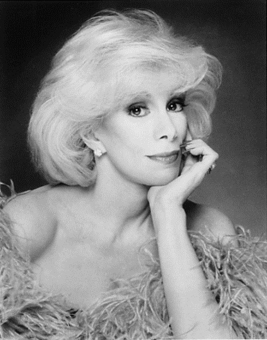 Imagen publictaria de Joan Rivers (1987).